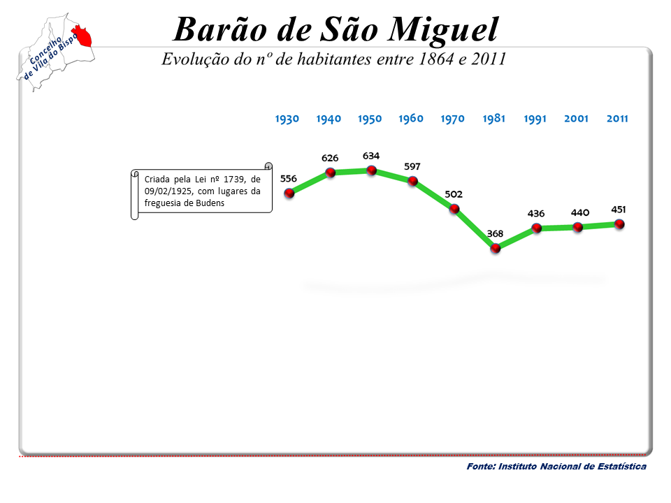 Censos 1864/2011